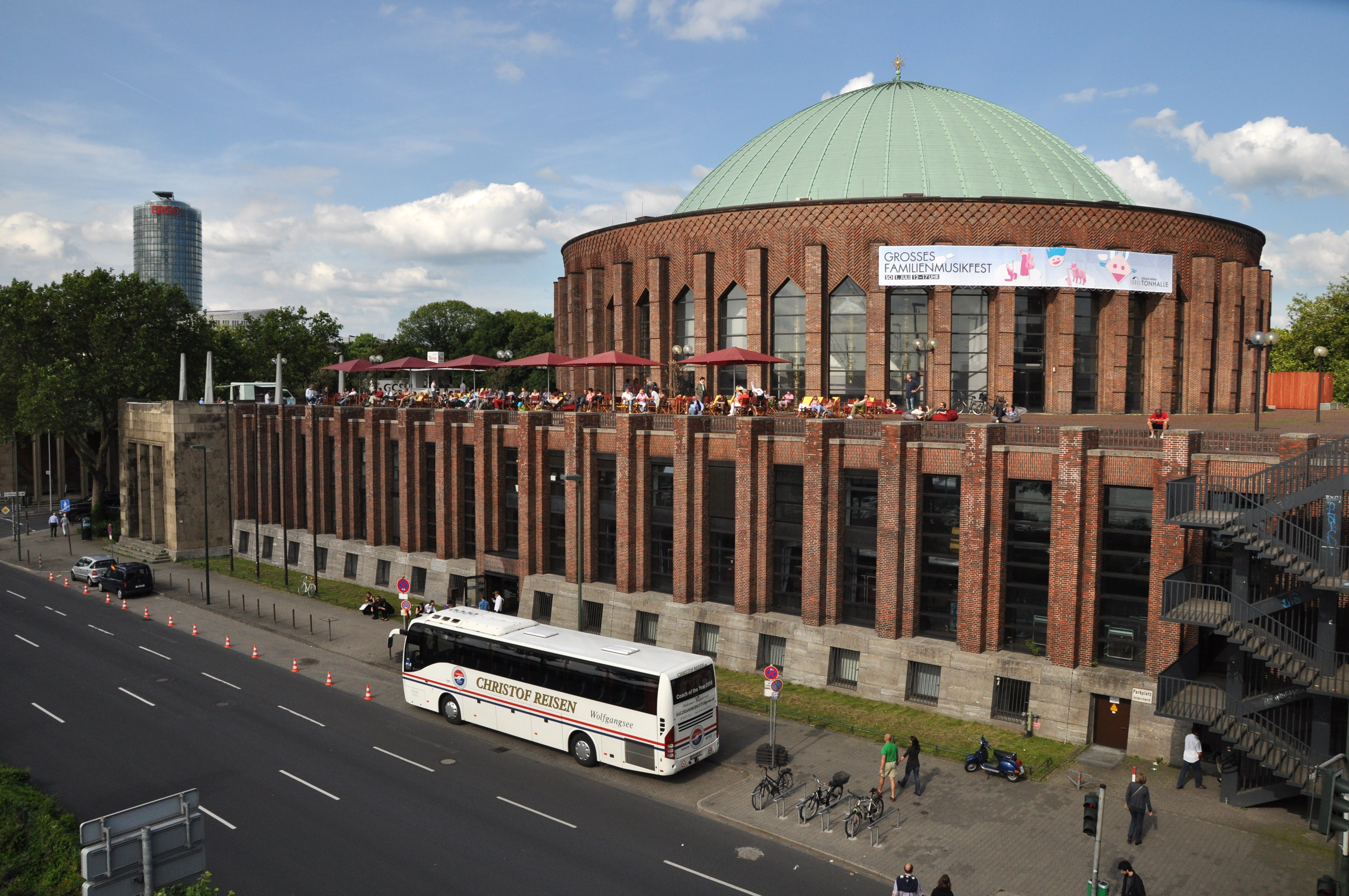 Impressionen aus dem Düsseldorfer Norden zwischen Theodor-Heuss-Brücke und Oberkasseler Brücke vom 17. Juni 2012.